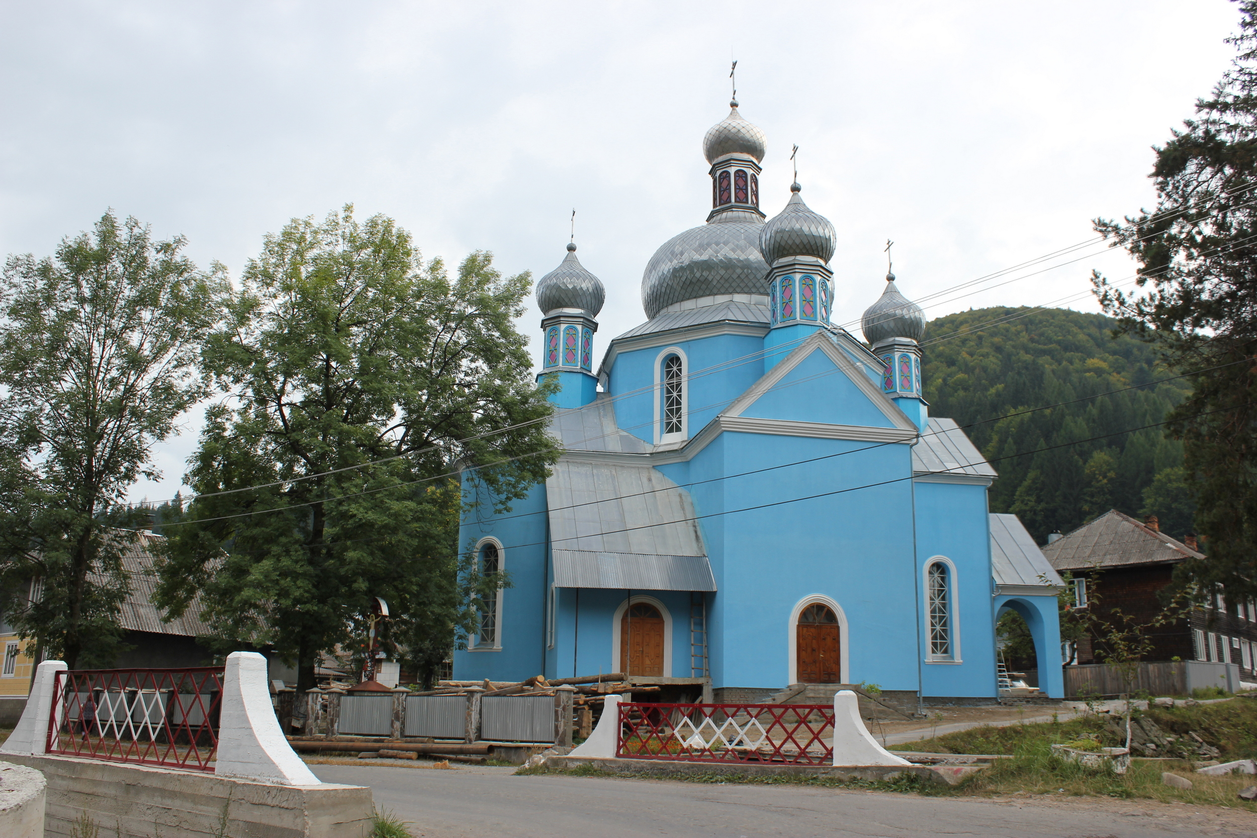 Kirche in Ust-Tschorna, Transkarpatien, Ukraine.